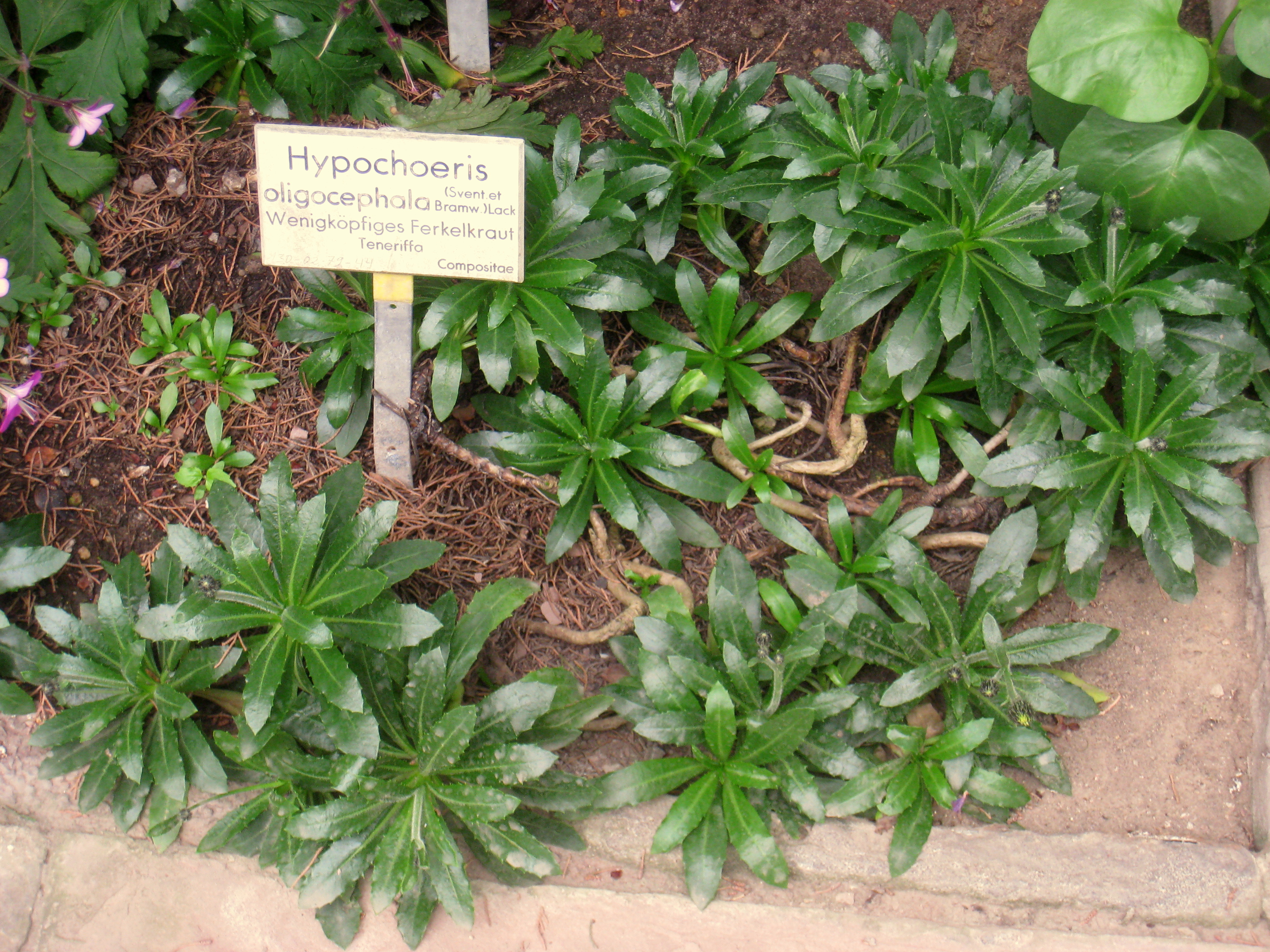 Hypochoeris oligocephala specimen in the Botanischer Garten, Berlin-Dahlem (Berlin Botanical Garden), Berlin, Germany.